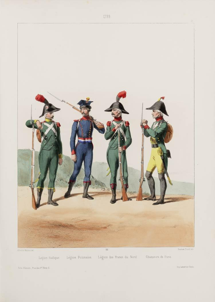 1799. Légion Italique; Légion Polonaise; Légion des Francs du Nord; Chasseurs de Paristratto da: "Costumes militaires français depuis 1439 jusqu'en 1789 / A. de Marbot" Gambart, Junin & Co